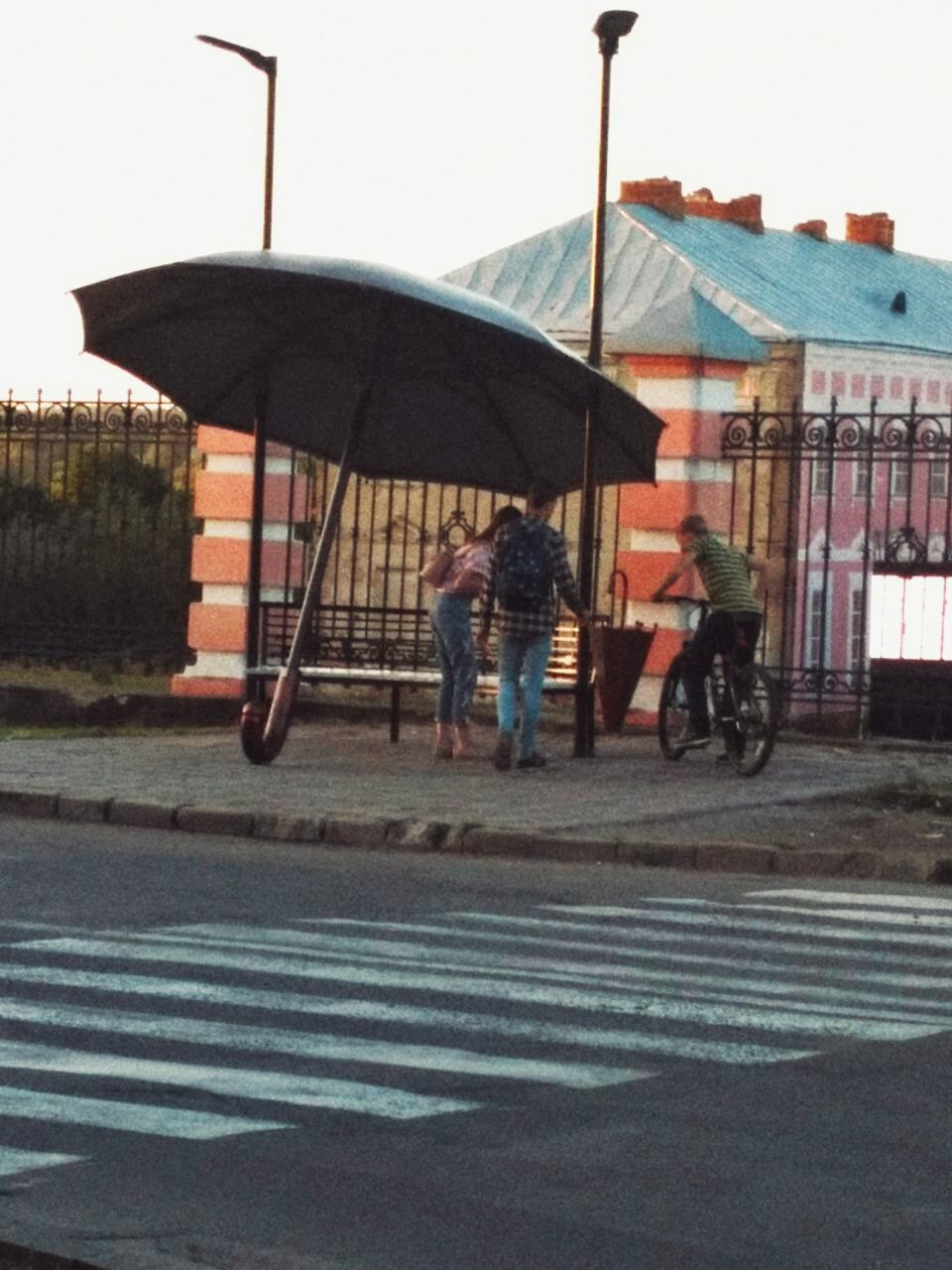 Декорації до оперифест